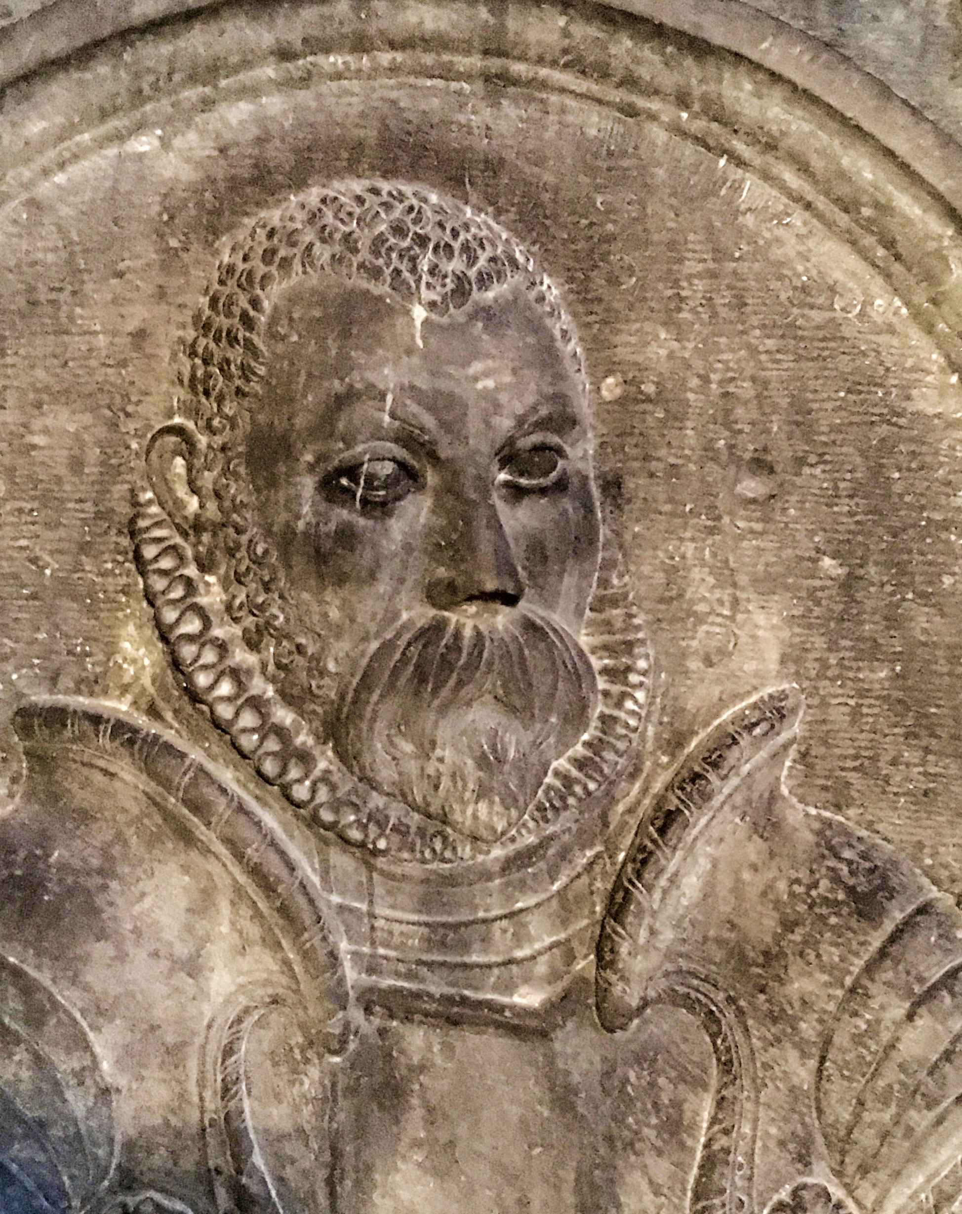 Steen Bille, detalje fra gravsten i Mariakirken, Helsingborg, Sverige